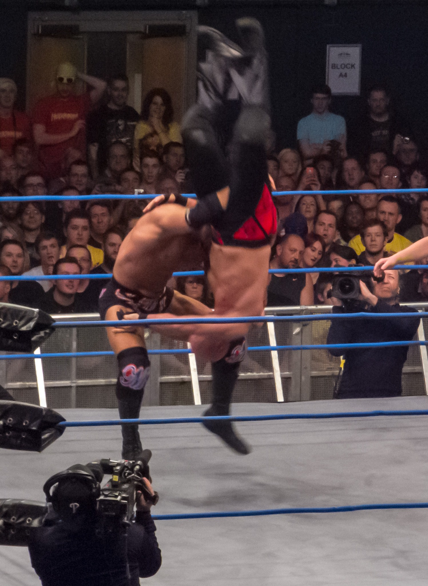 Magnus performing a mag daddy driver